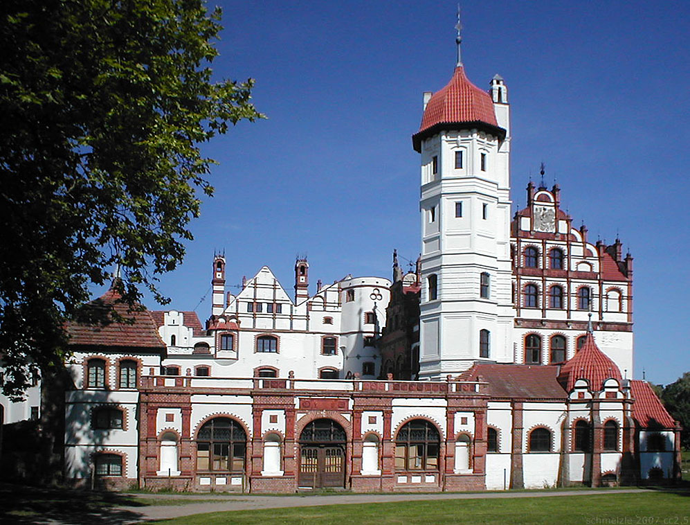 Schloss der Grafen Hahn in Basedow, Mecklenburg-Vorpommern, Deutschland